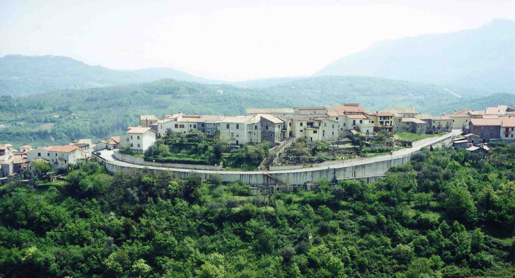 Cassano Irpino, Campania, Italia